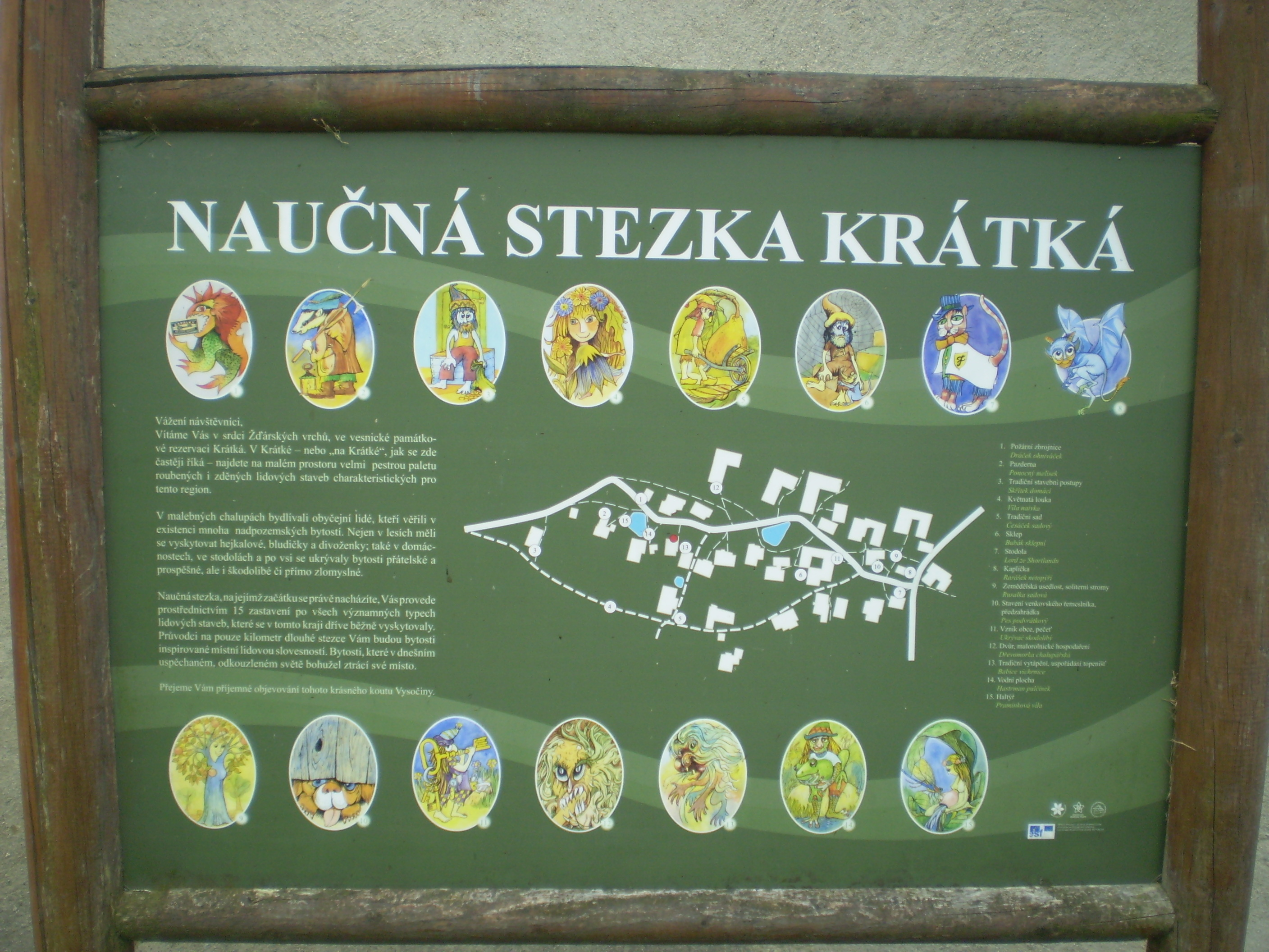 mapka naučné stezky Krátká